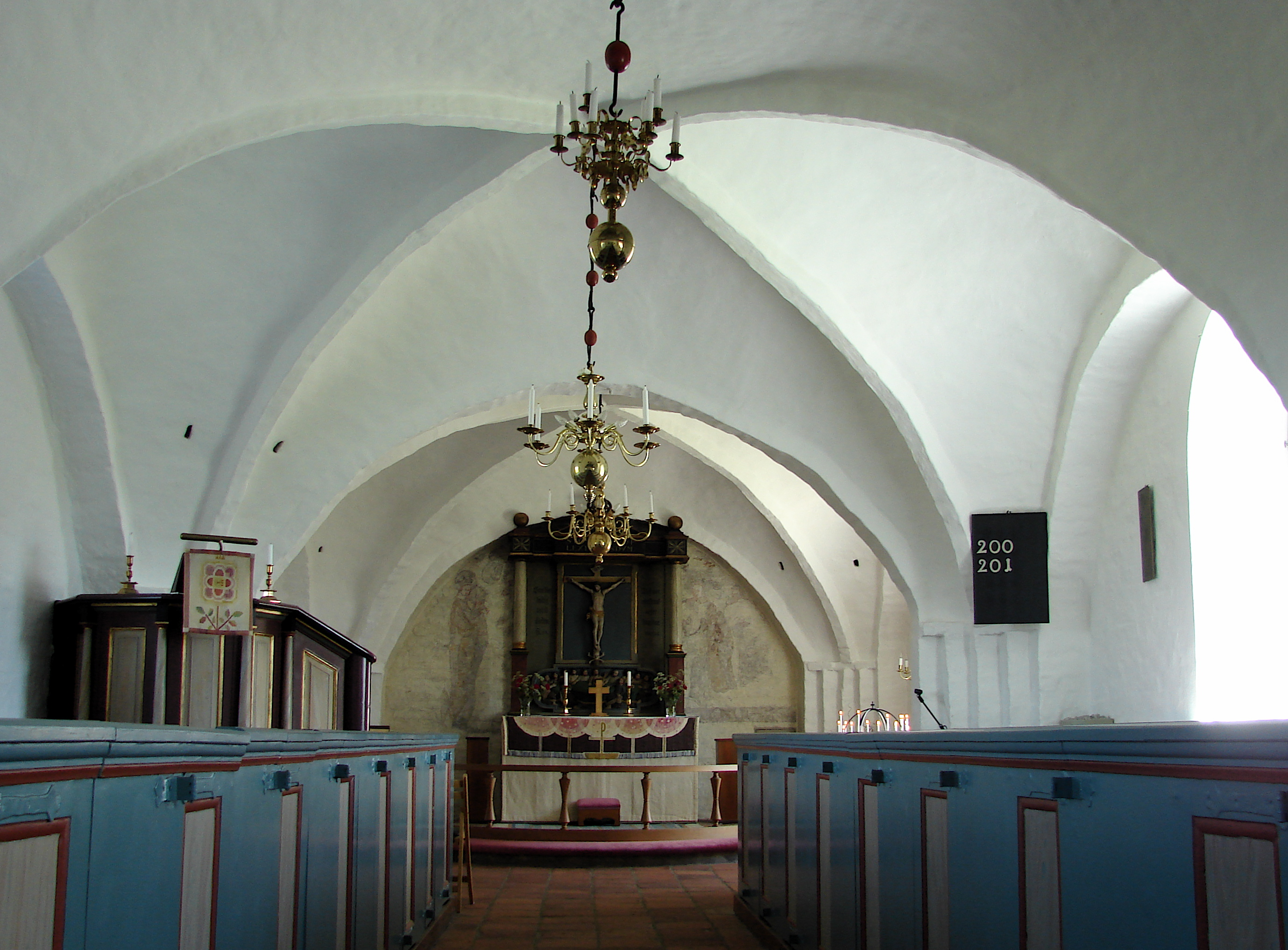 Saint Ursula church, Ivö, Ifø, Sankt Ursula Kirke, interior, Anders Sunesen